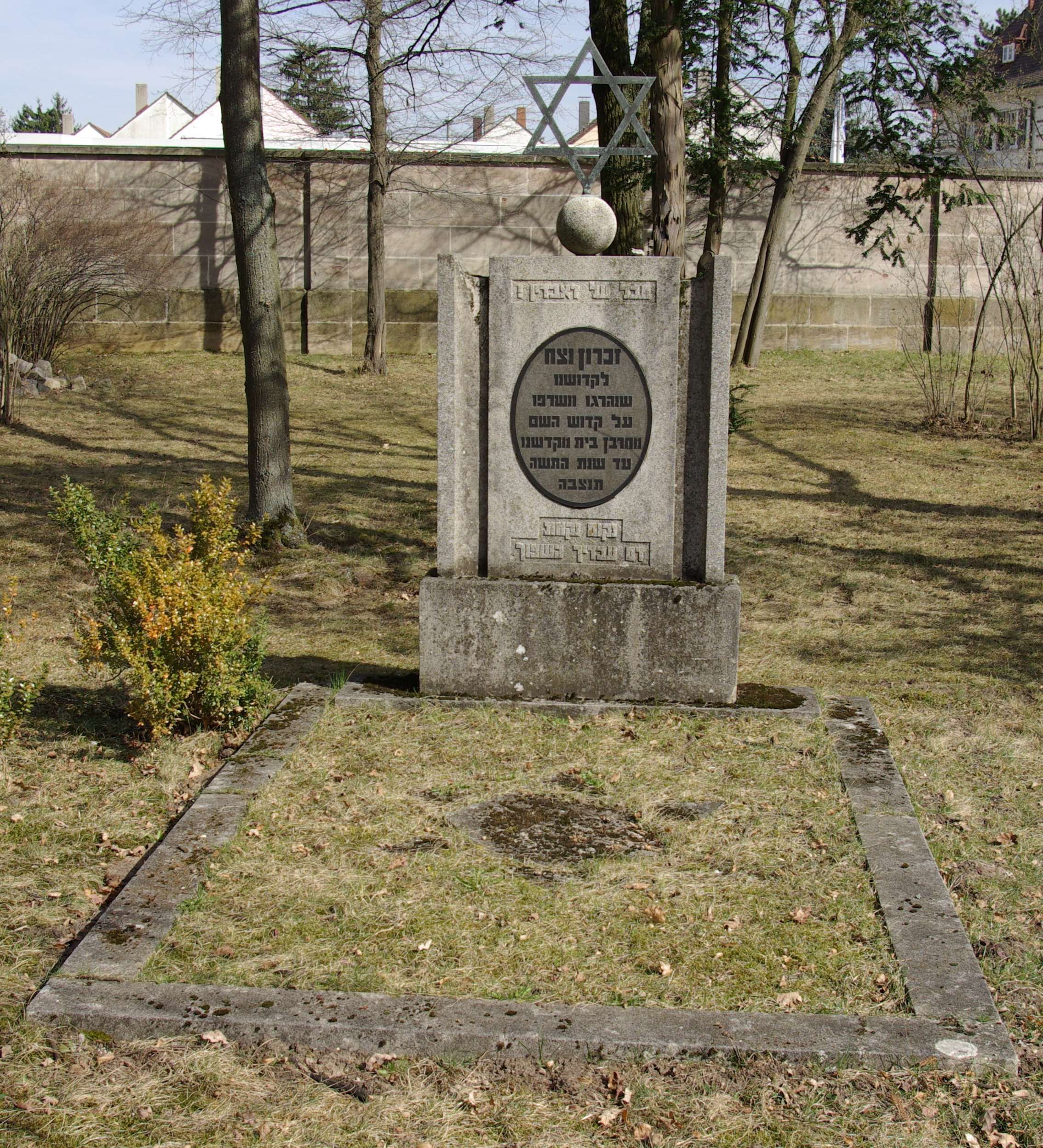 Shoa-Denkmal im Neuen Jüdischen Friedhof Fürth, es wurde 1947 im DP-Lager Fürth Finkenschlag aufgestellt und 1949 an seinen heutigen Standort gebracht.